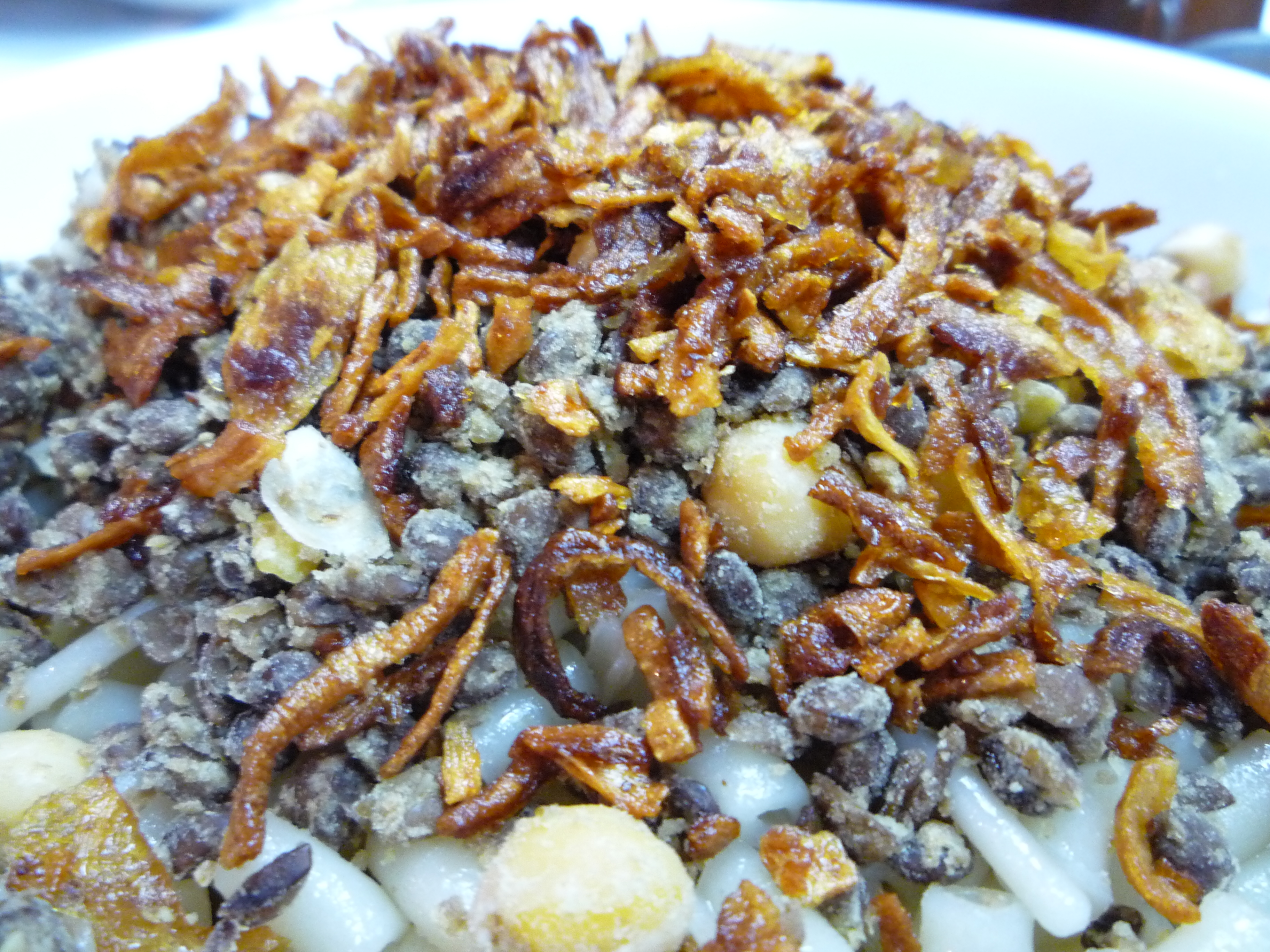 Kushari, koshary, kosheri, koshari, كشرى